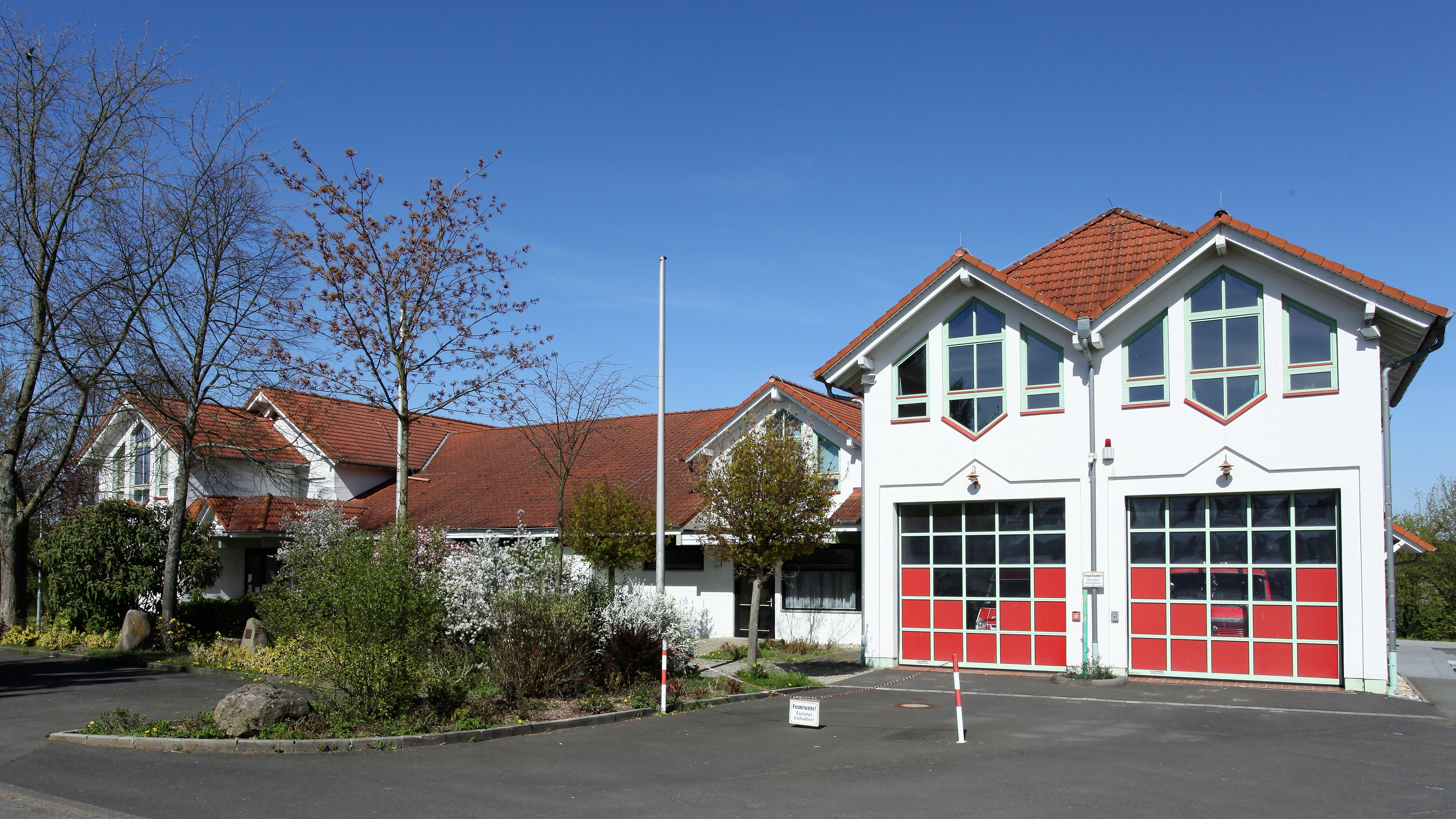 Hattenrod Dorfgemeinschaftshaus und Feuwehr